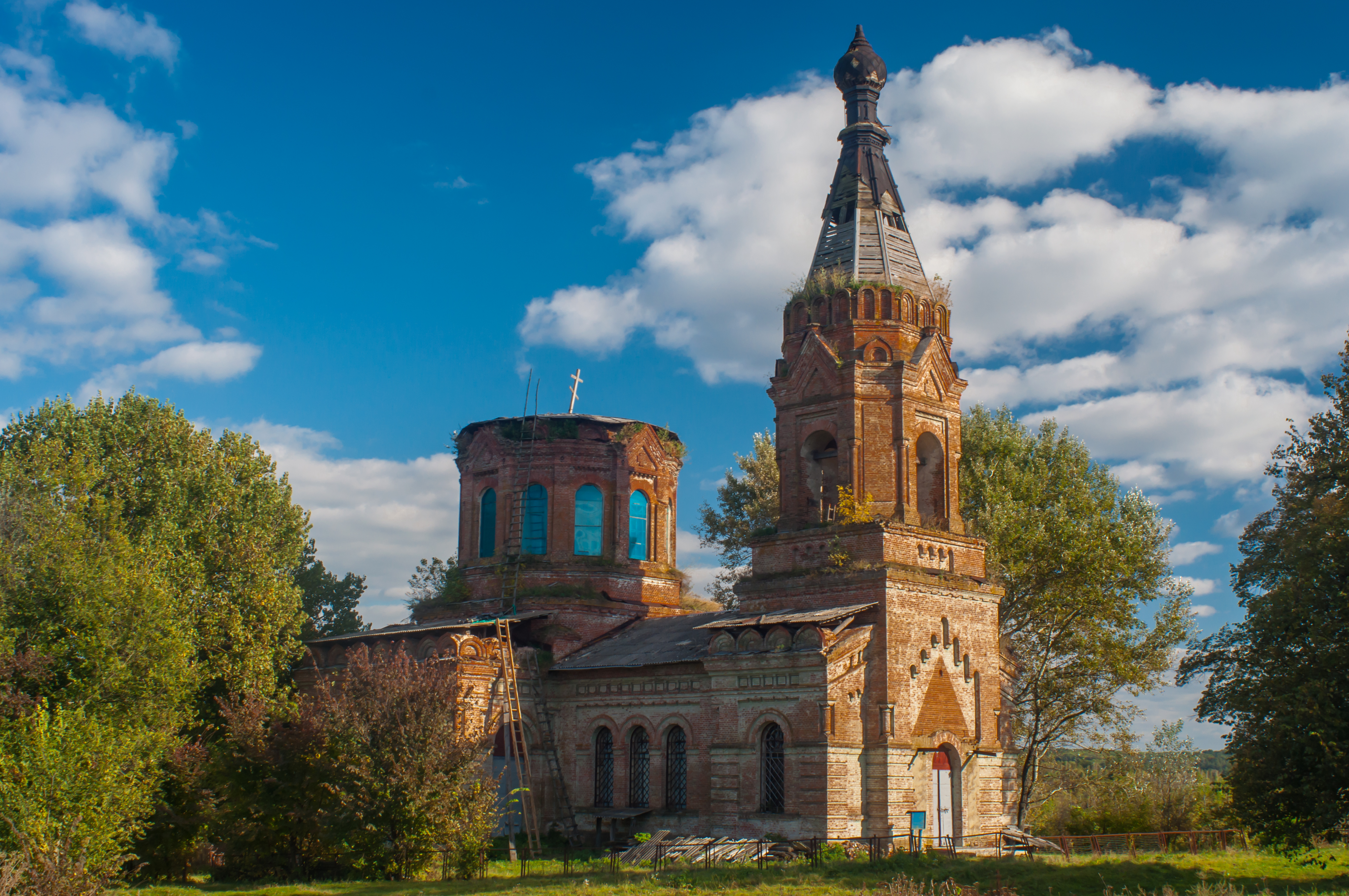 Михайлівська церква (мур.), село Малий Вистороп, вул. Лебединська, 1а